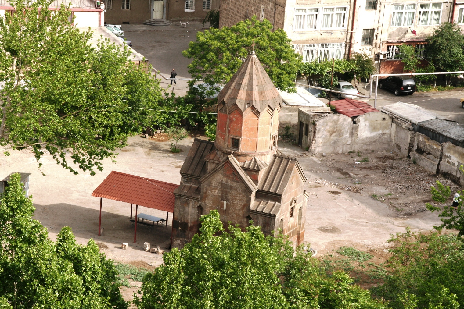 Église de Katoghike au centre d'Erevan, Arménie